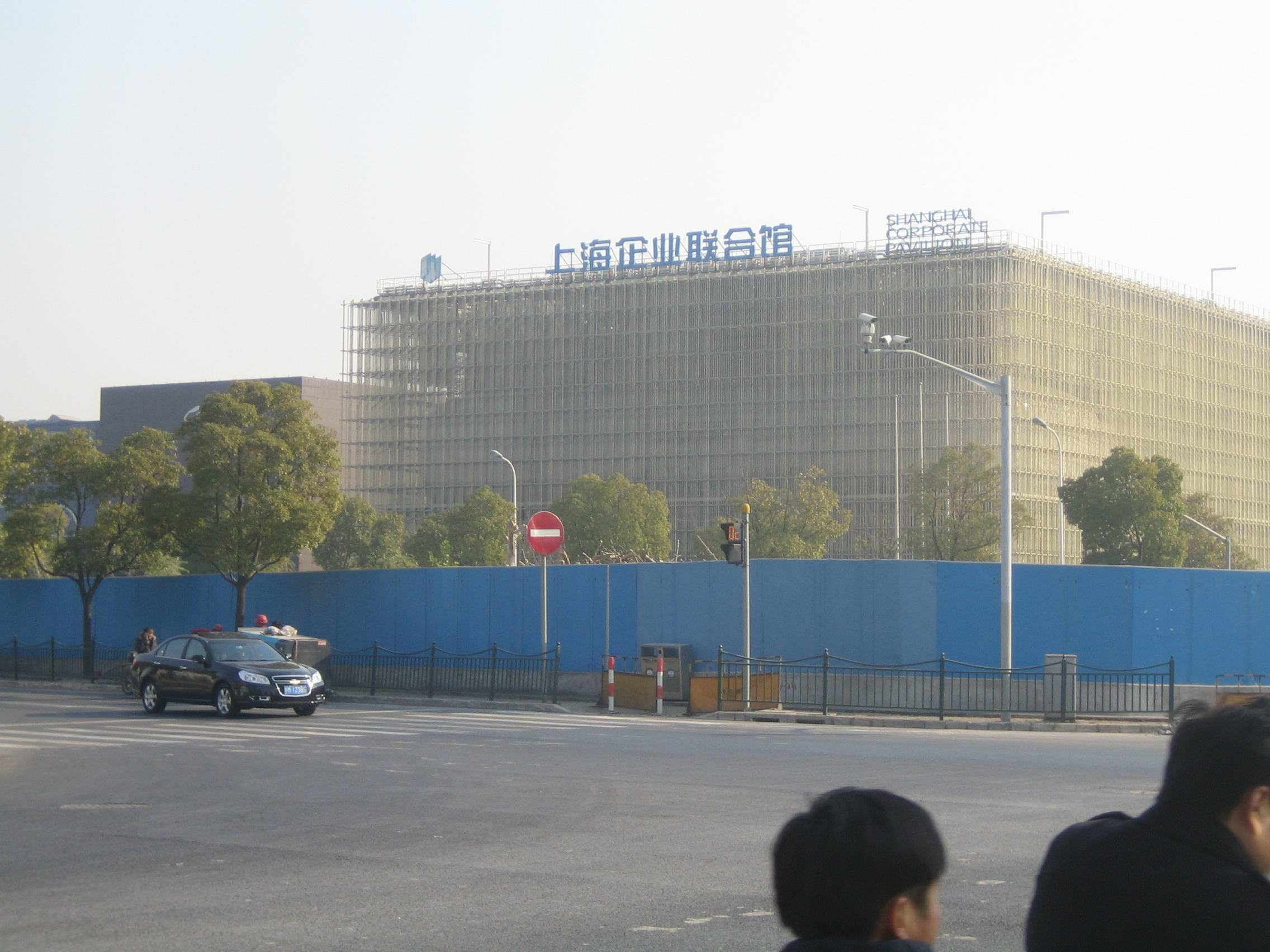 2014年12月24日拍摄的世博园区内的上海企业联合馆